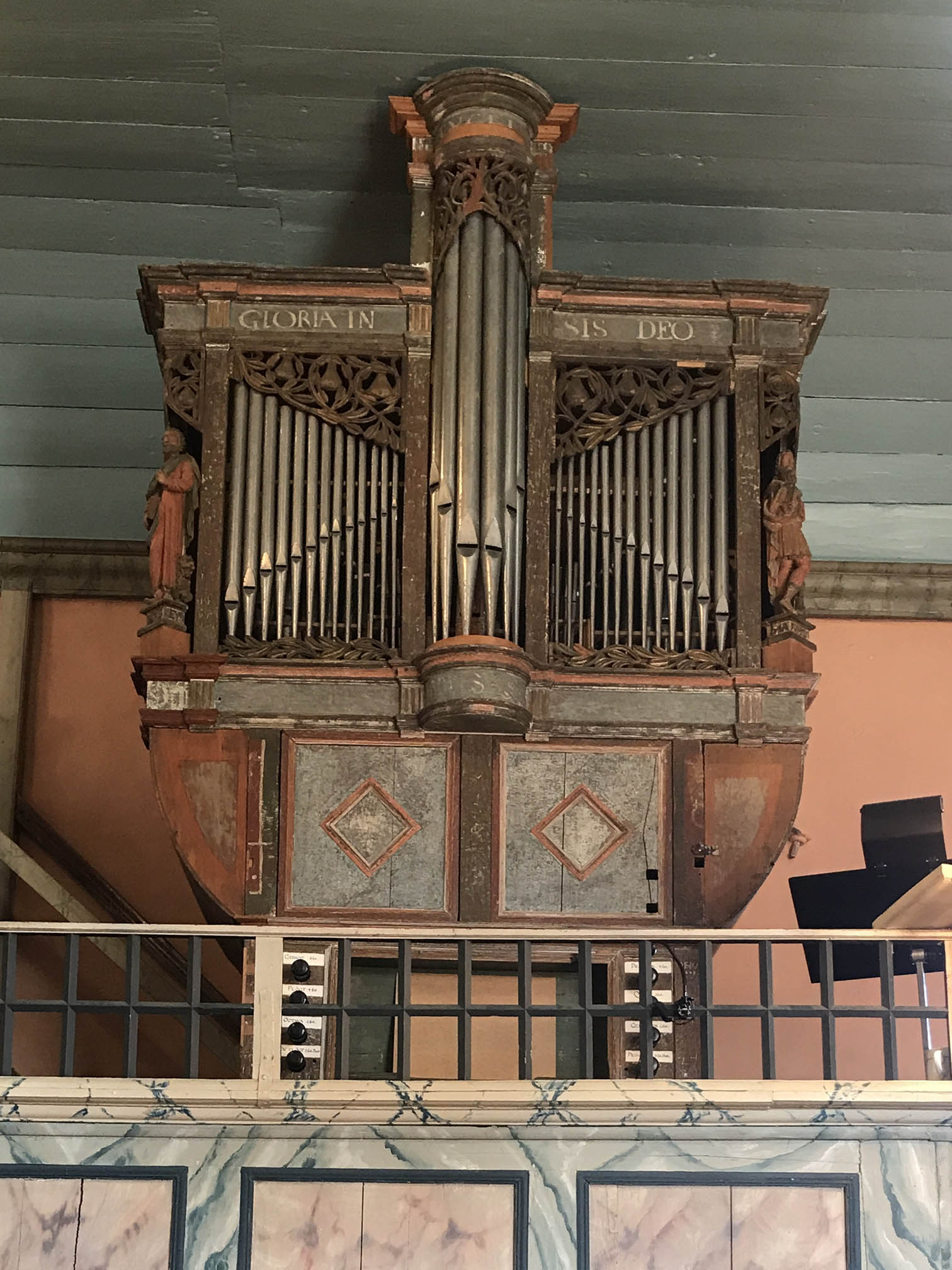 Orgeln i Morlanda kyrka på sin läktare